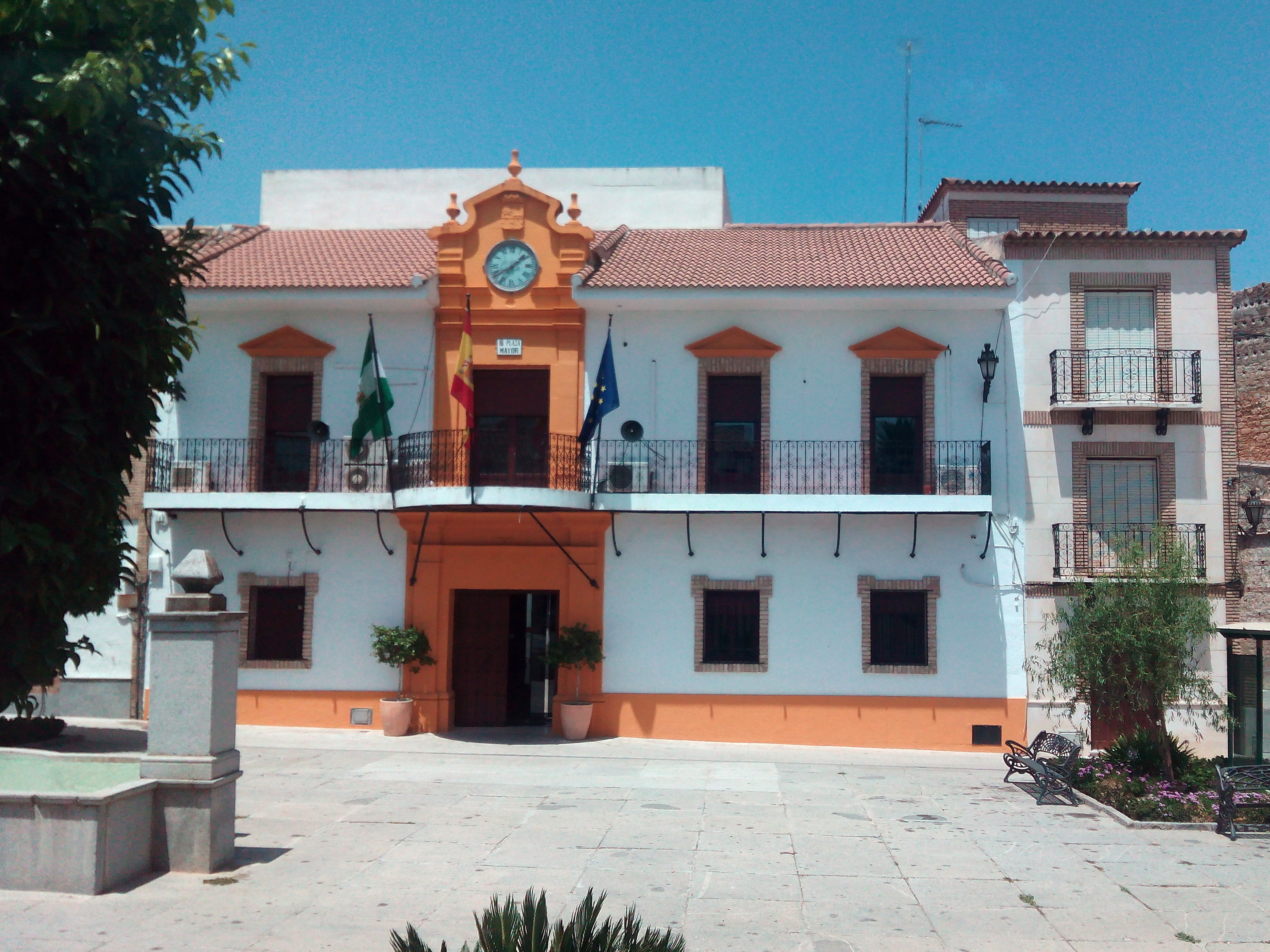 Ayuntamiento de Santaella (España).